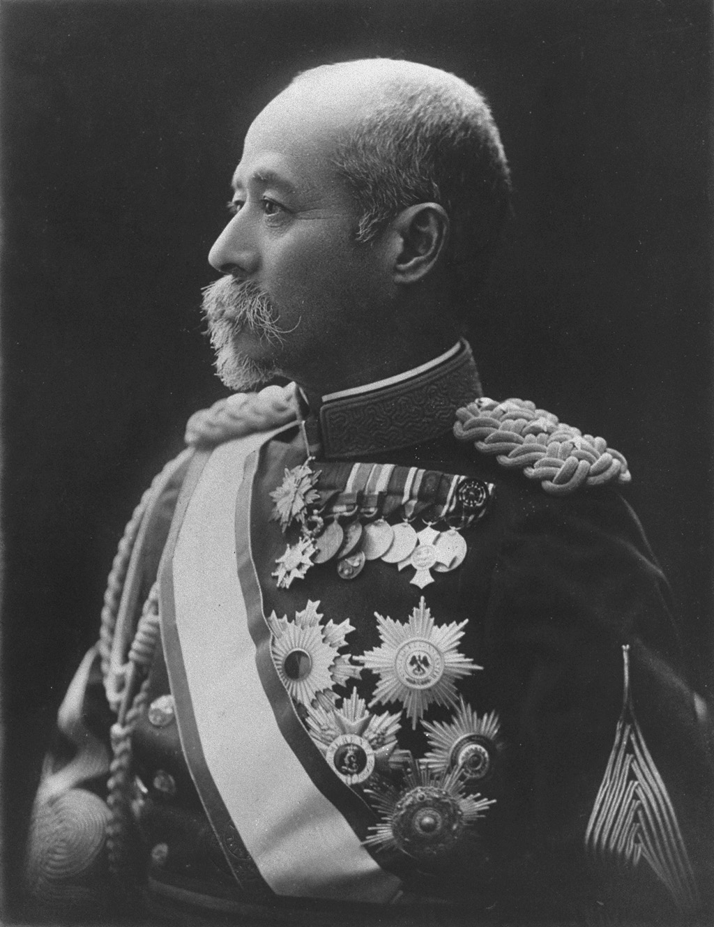 Portrait of Kodama Gentaro (児玉源太郎, 1852 – 1906)